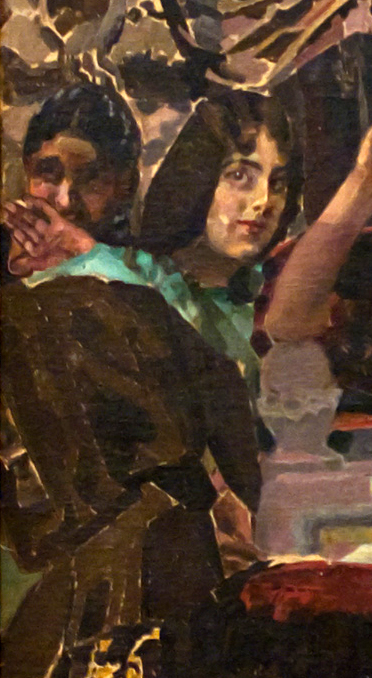 detail